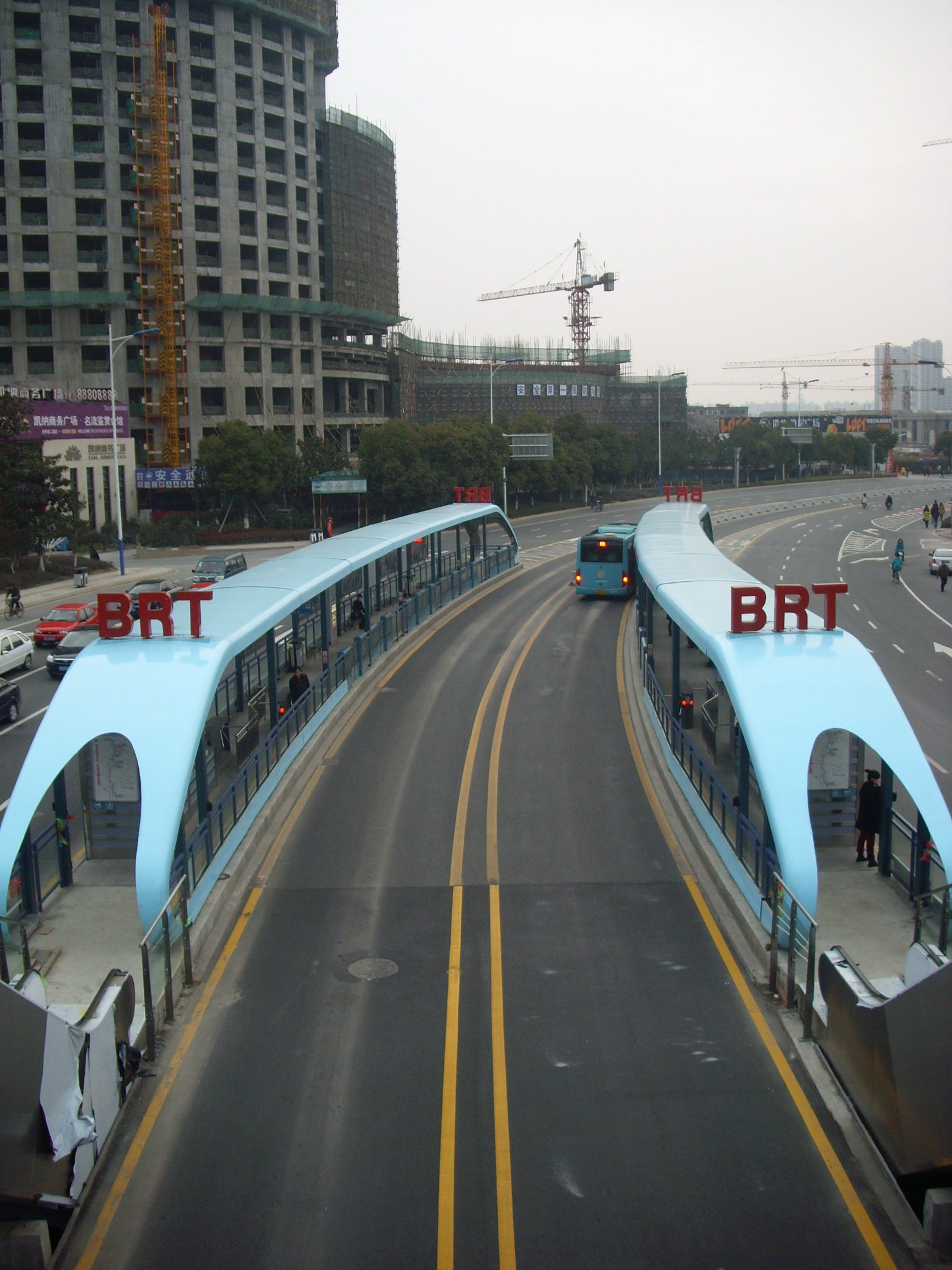 常州BRT一號線西新橋站